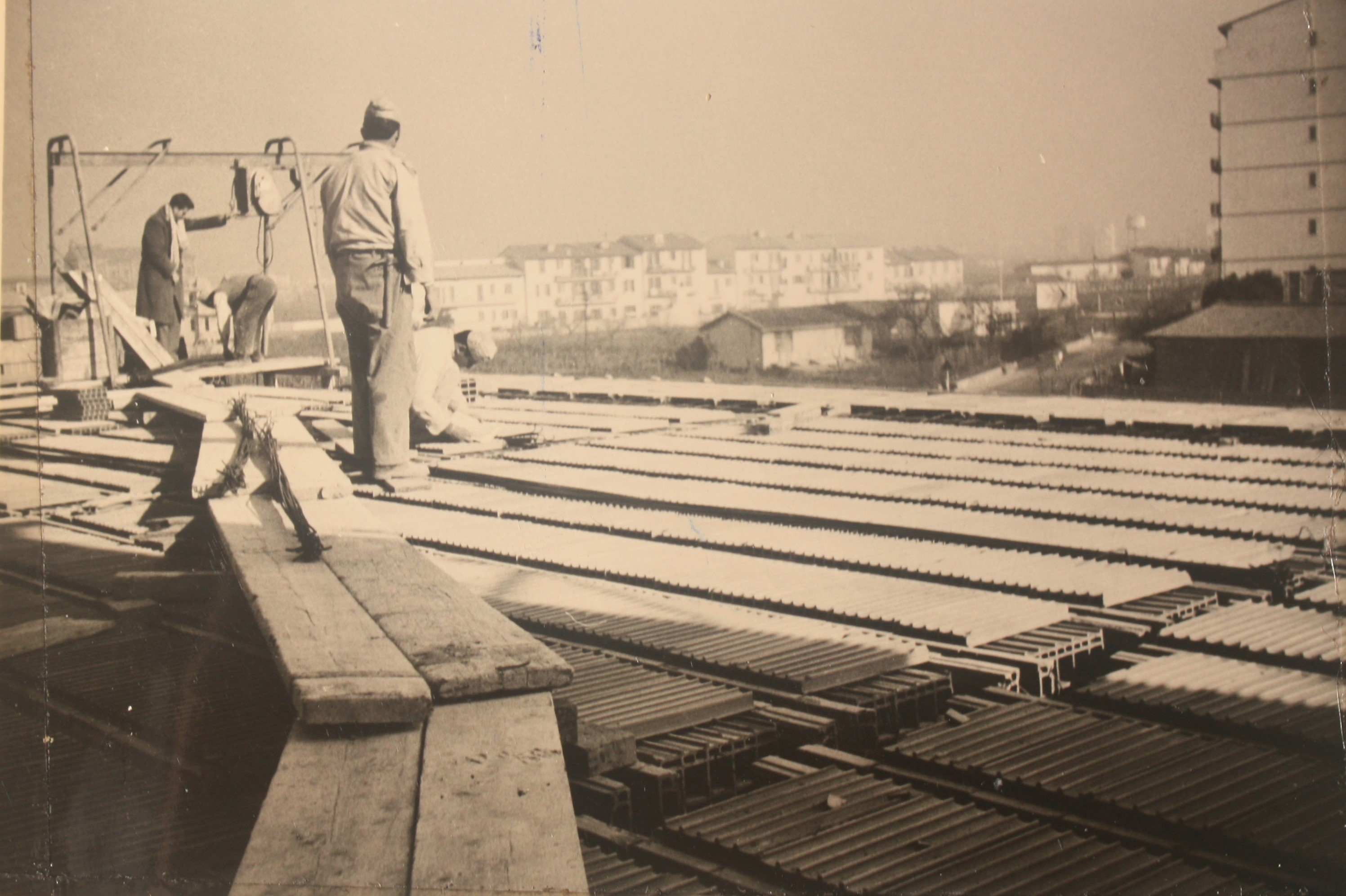 Costruzione del "Circolino" della Chiesa di San Quirico a Legnaia, foto in bianco e nero